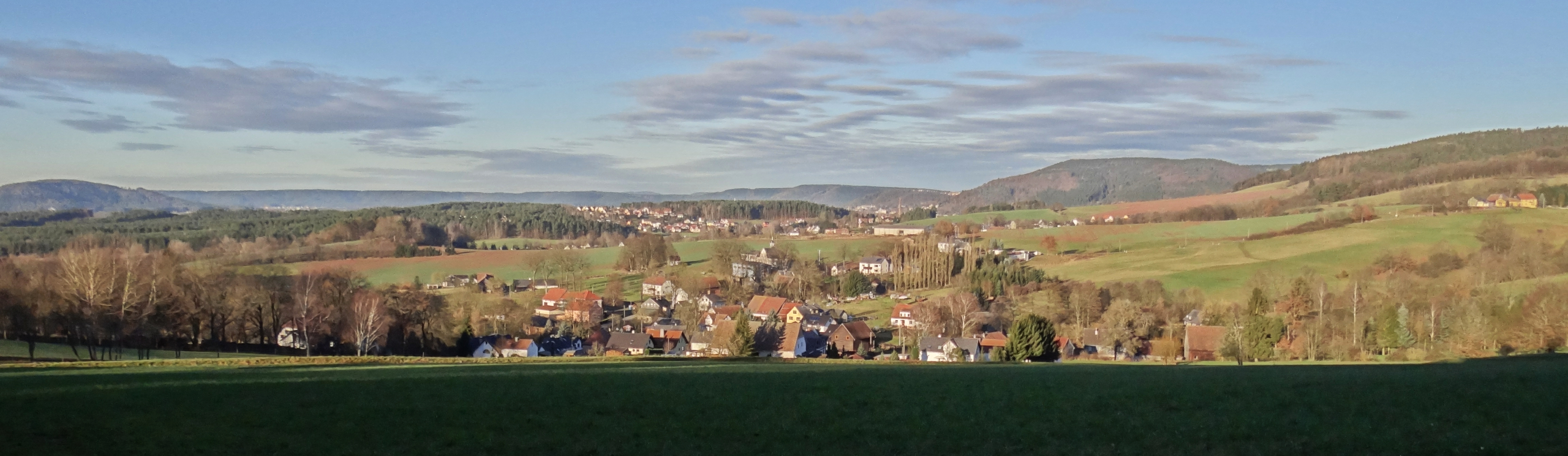 Blick über Schwärzdorf